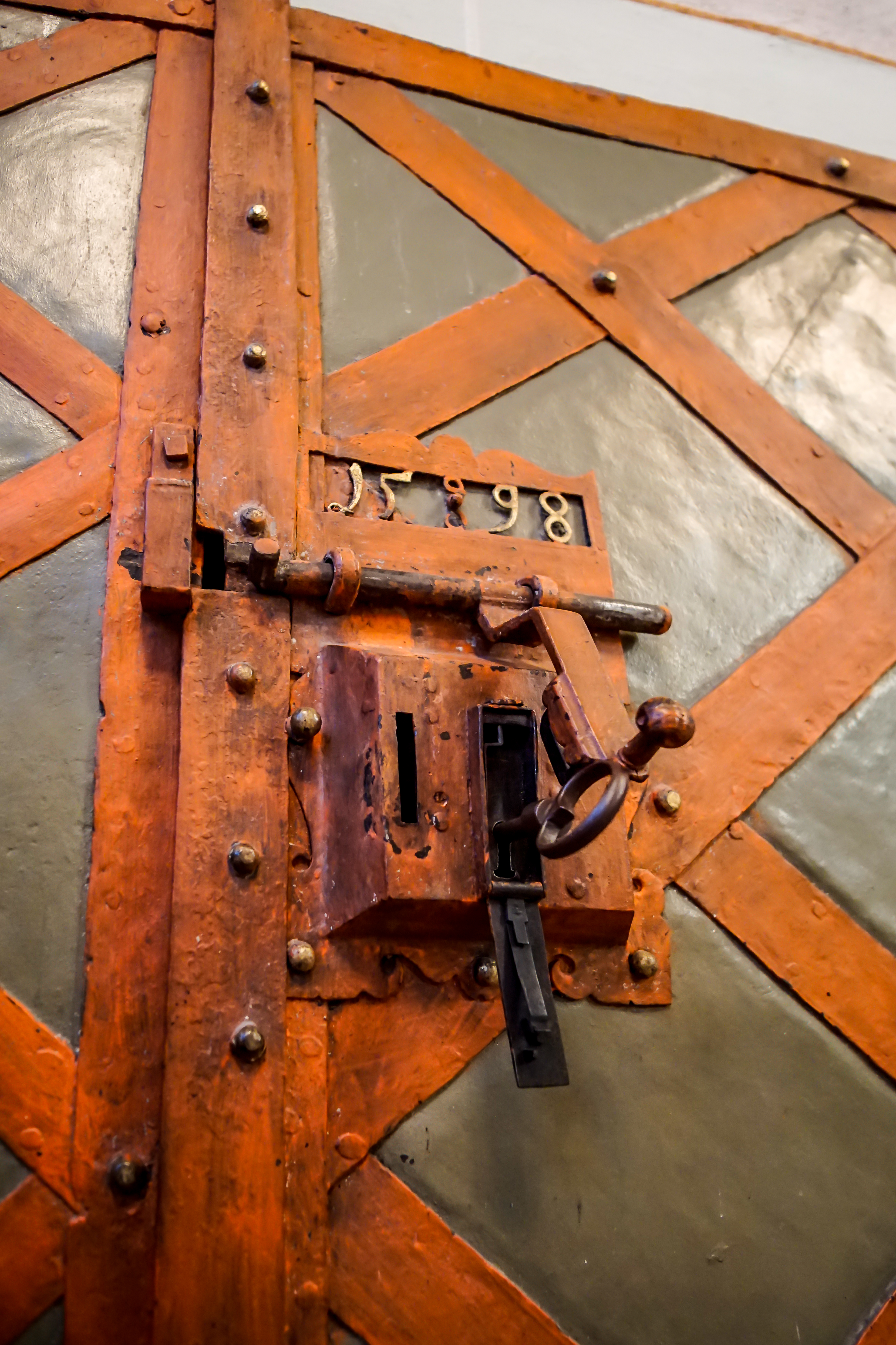 Stadtkirche Balingen: Registratur Wandschrank der Heiligenvogtei